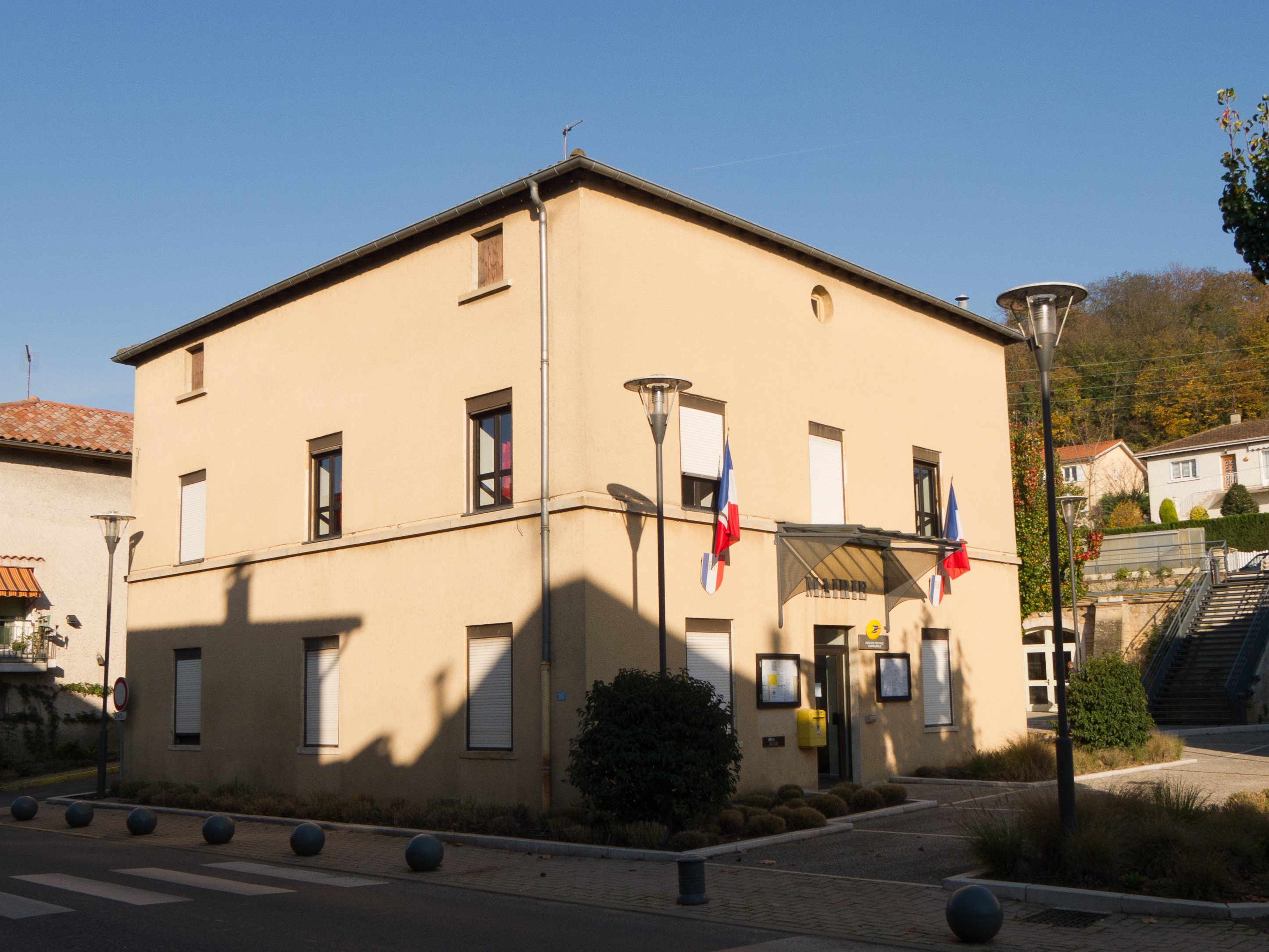 Mairie de Beauregard Beauregard - Beauregard - Ain - France